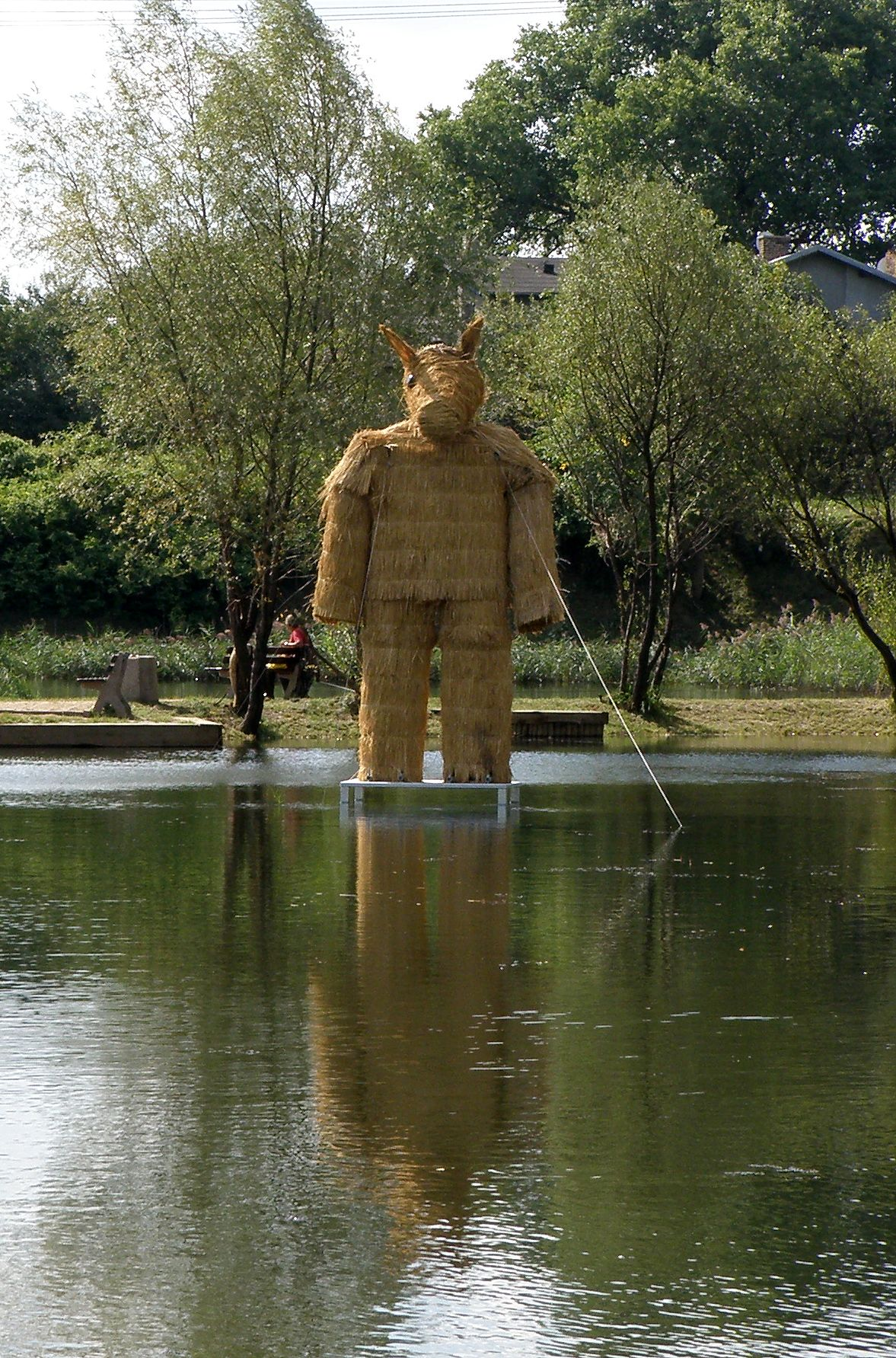 Miś - replika oryginału postawiona w 2011 na Gliniankach Schnaidera, Warszawa, Bemowo